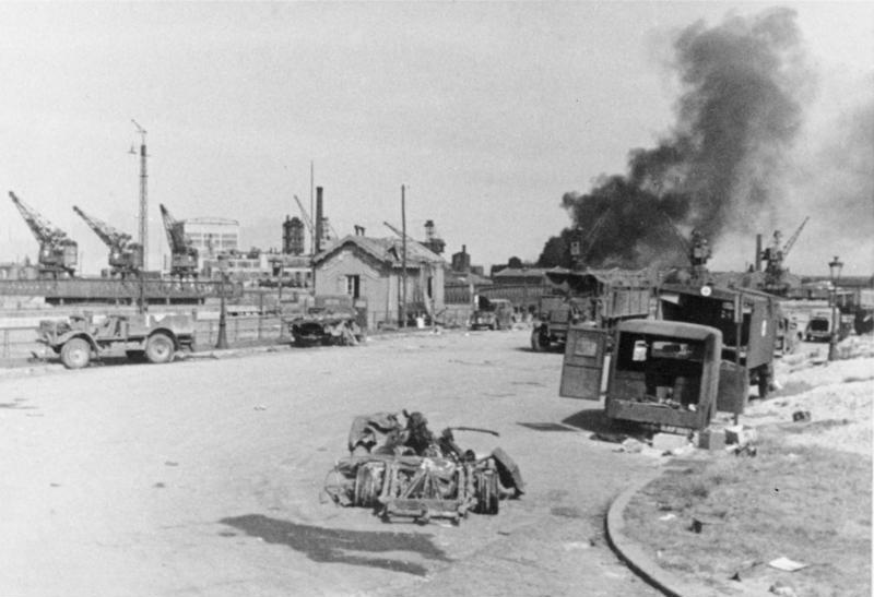 Brennendes Öllager im Hafen von Calais, von Engländern in Brand gesteckt. Calais. 31.5.1940. 15.30 Uhr